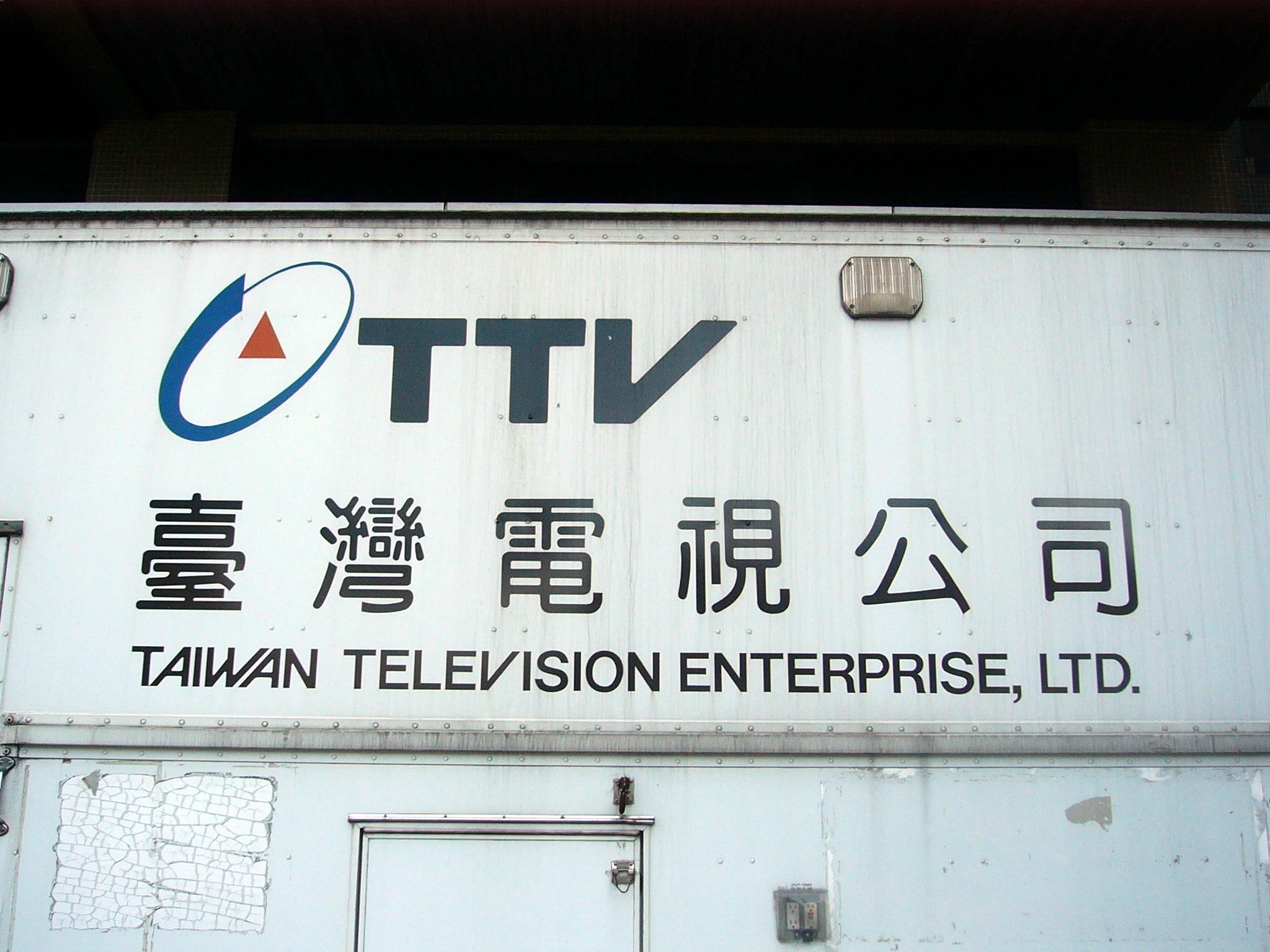 中文（台灣）: 臺灣電視公司轉播車BP-366左側車身的台視第二代企業識別標誌及中英雙語標準字。